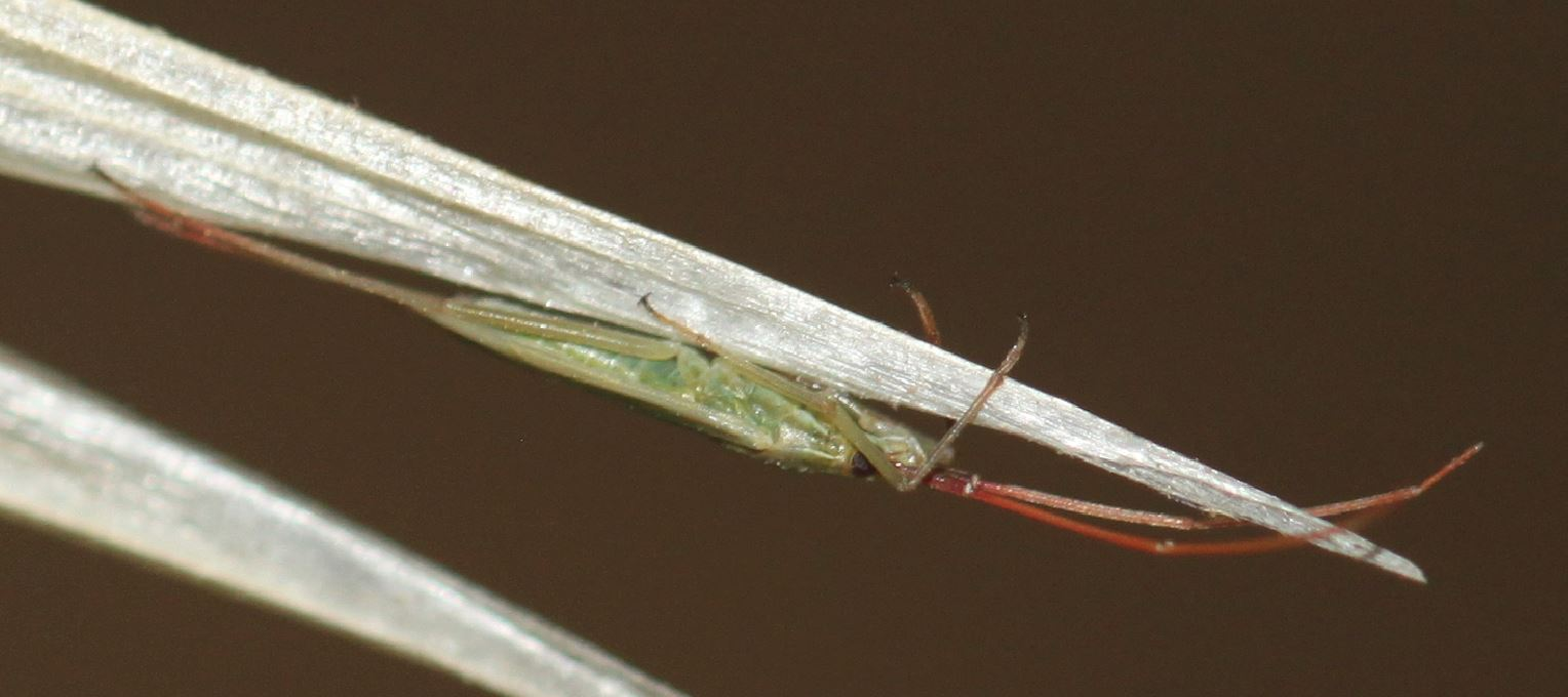 Wanze Trigonotylus ruficornis am 27. Juni 2019, an der Côte d’Azur, nachts auf der Unterseite eines Stängels